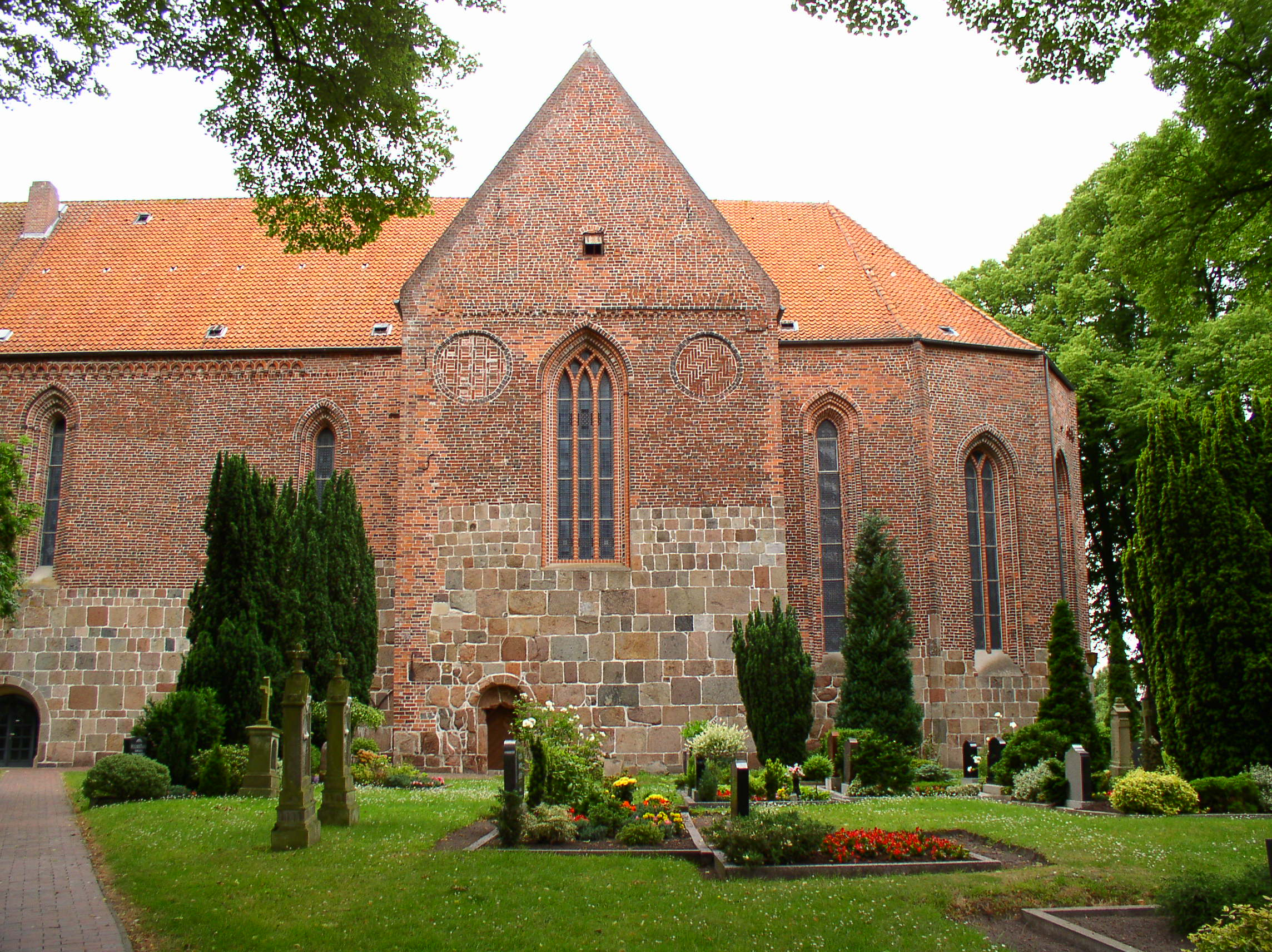 Ansicht Kirche Reepsholt 1